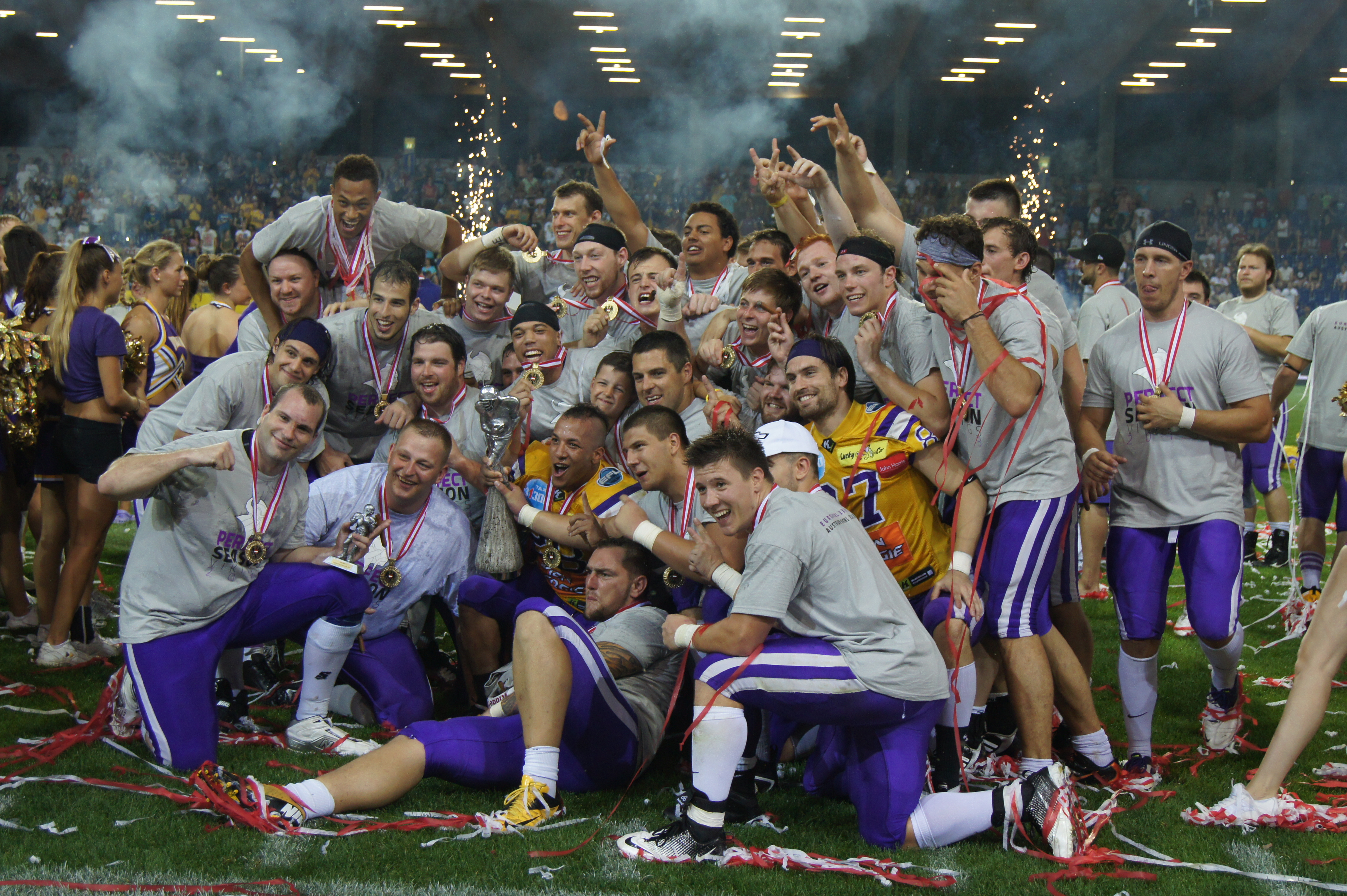 Austrian Bowl XXIX in der NV Arena in St. Pölten